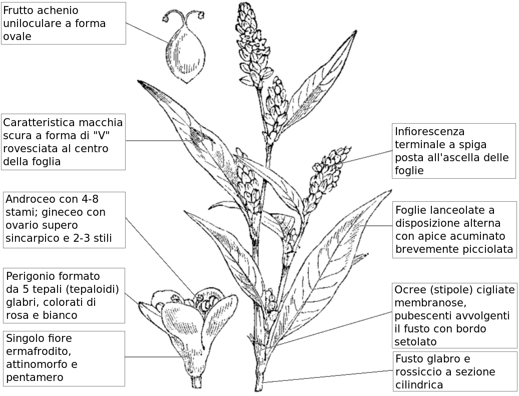 Persicaria maculosa